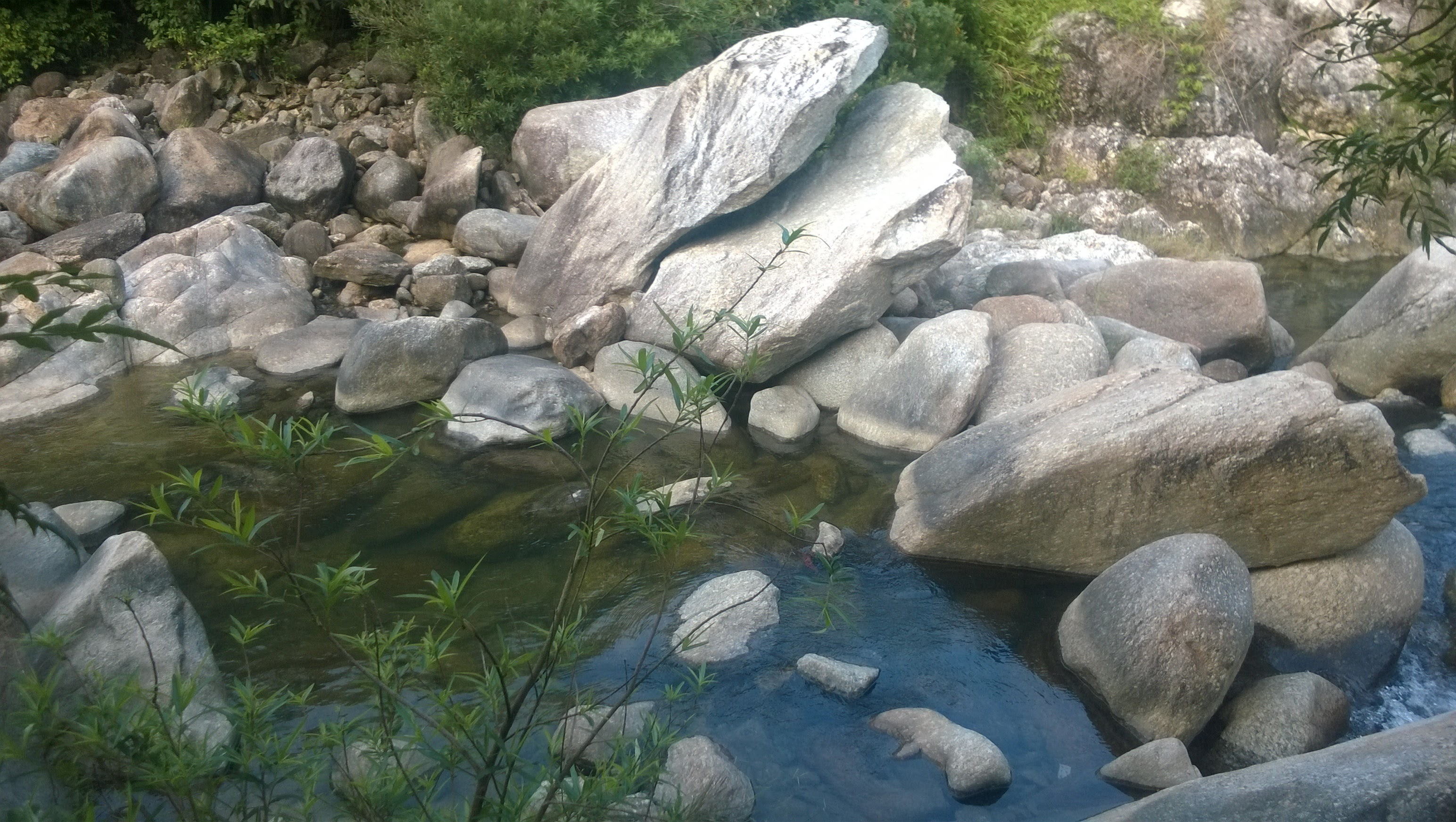 Khe Lim, Đại Lộc 4